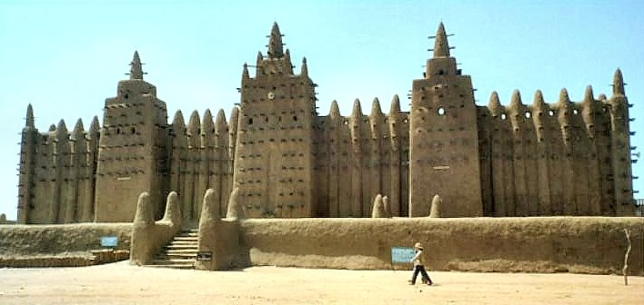 Moschee von Djenné Beschreibung: Die Moschee von Djenné Quelle: Foto von Klaus Kien, entstanden in den 90er Jahren im Rahmen der Städtepartnerschaft zwischen Bous (Saar) und Koulikoro Fotograf oder Zeichner: Klaus Kien, Gde. Bous (Saar)